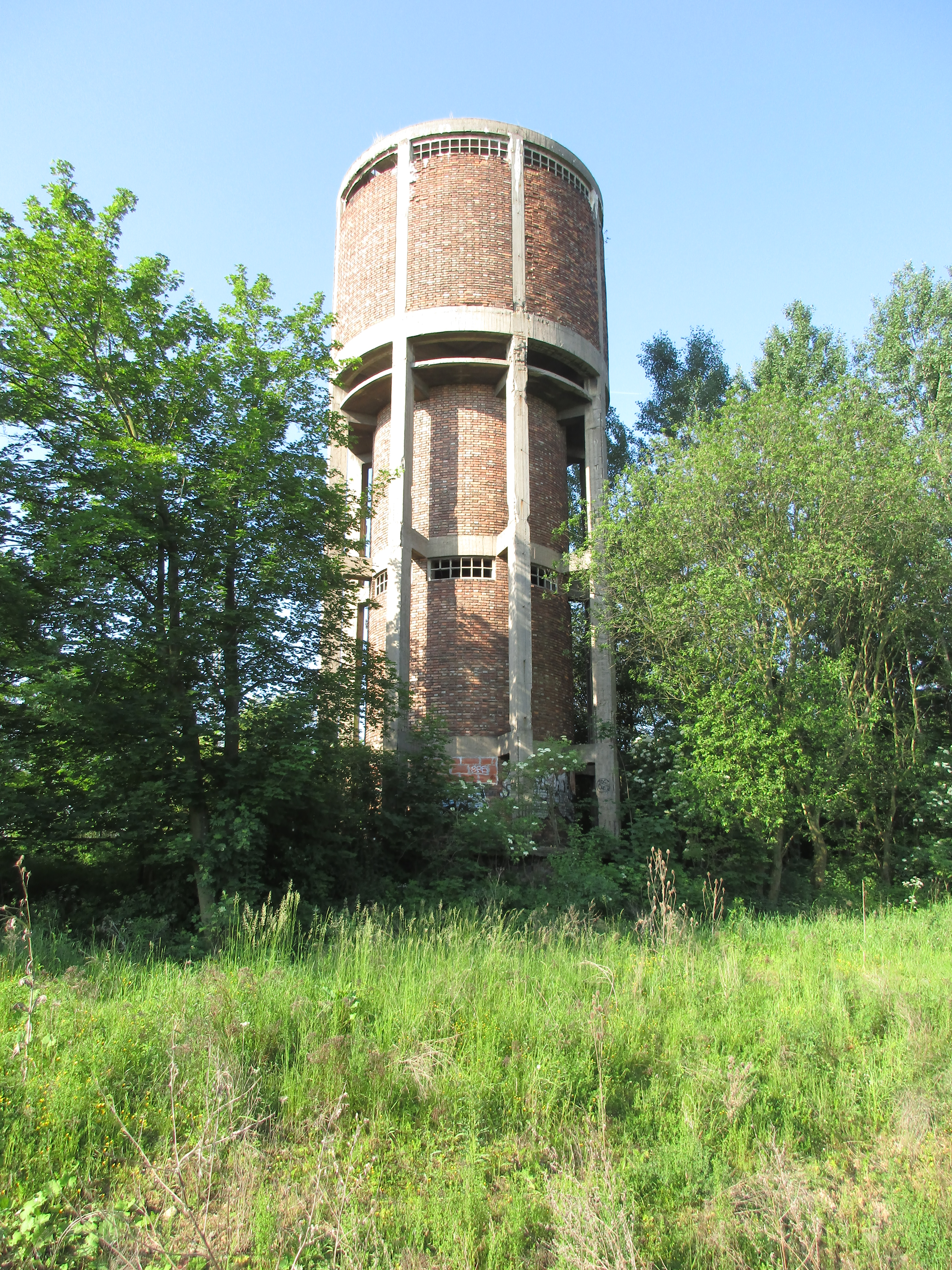 Drážní věžový vodojem, 1937, arch.Josef Danda. Nádraží Praha-Běchovice.